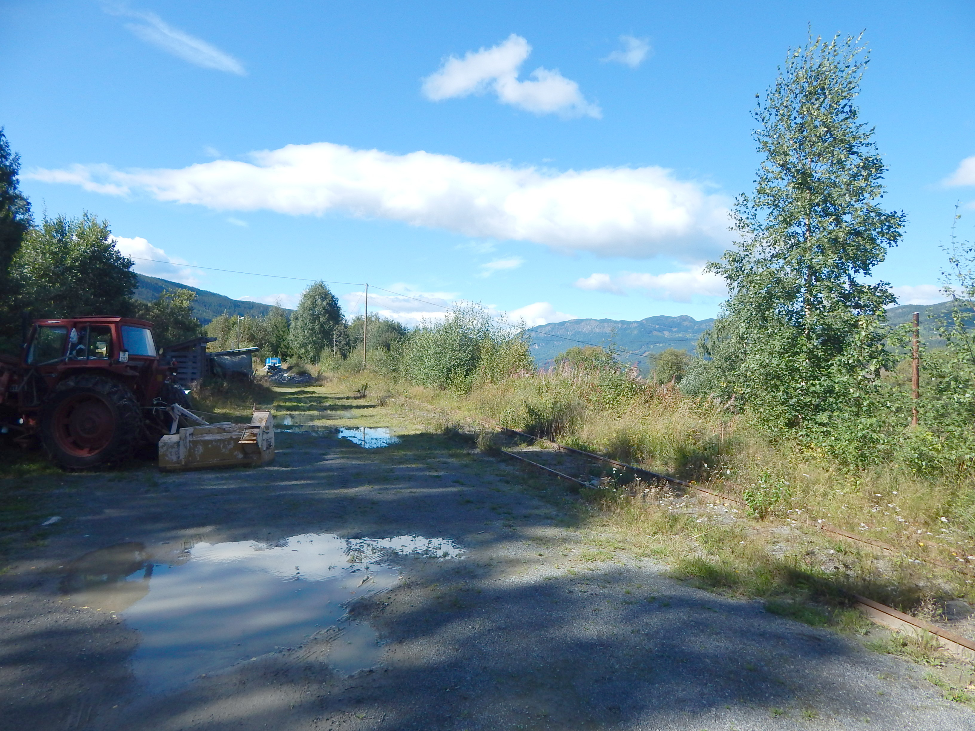 Stasjonsområdet på Nordsinni i 2016